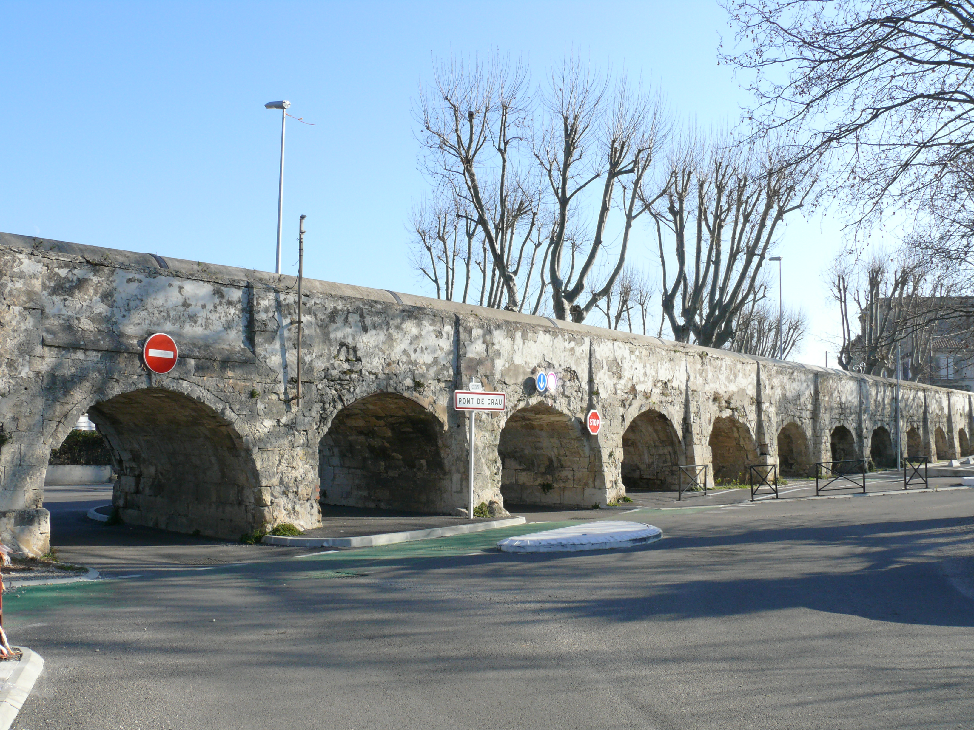 Arles - Aqueduc du pont de Crau